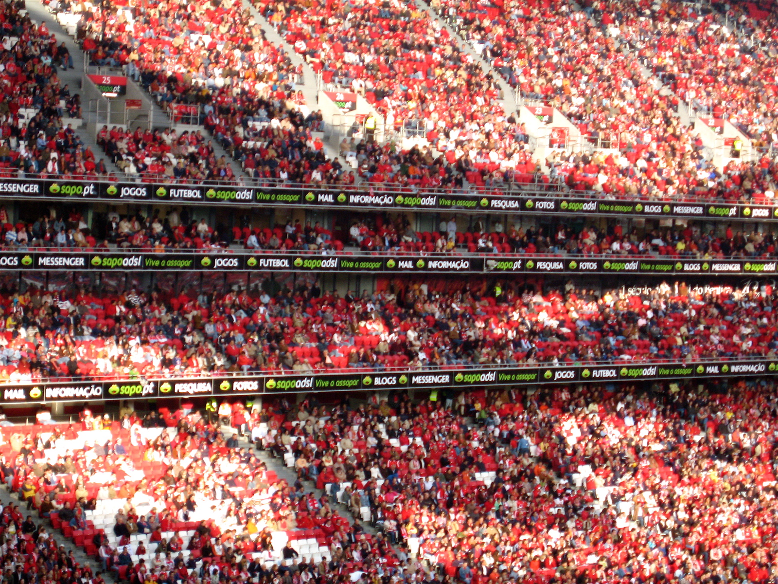 Benfica!